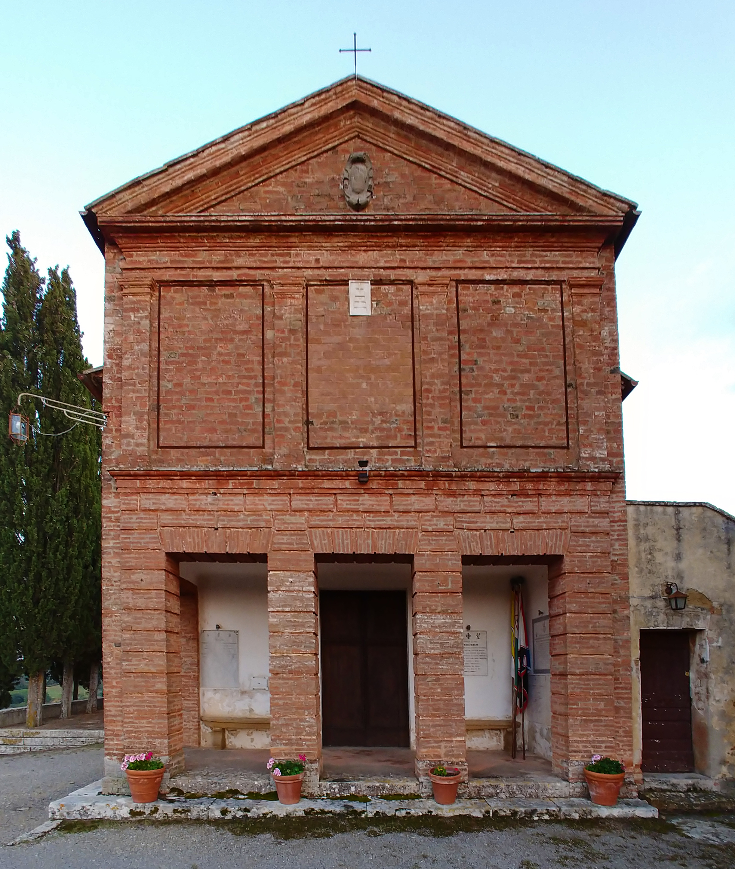 Facciata.